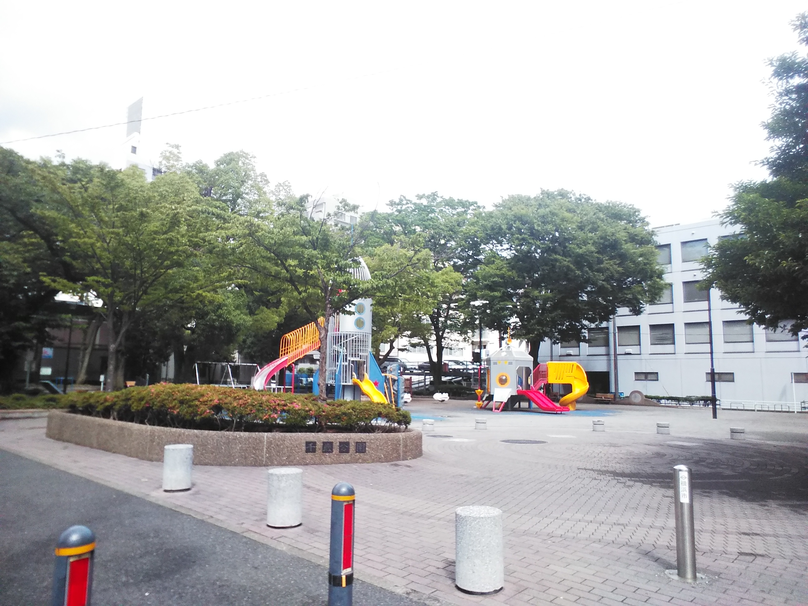 横浜市中区山田町、千歳公園